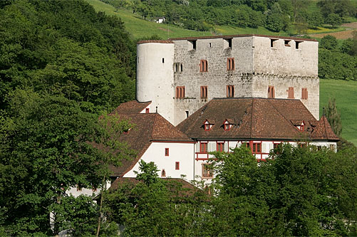 Schloss Angenstein (Privatbesitz) in Duggingen bei Aesch